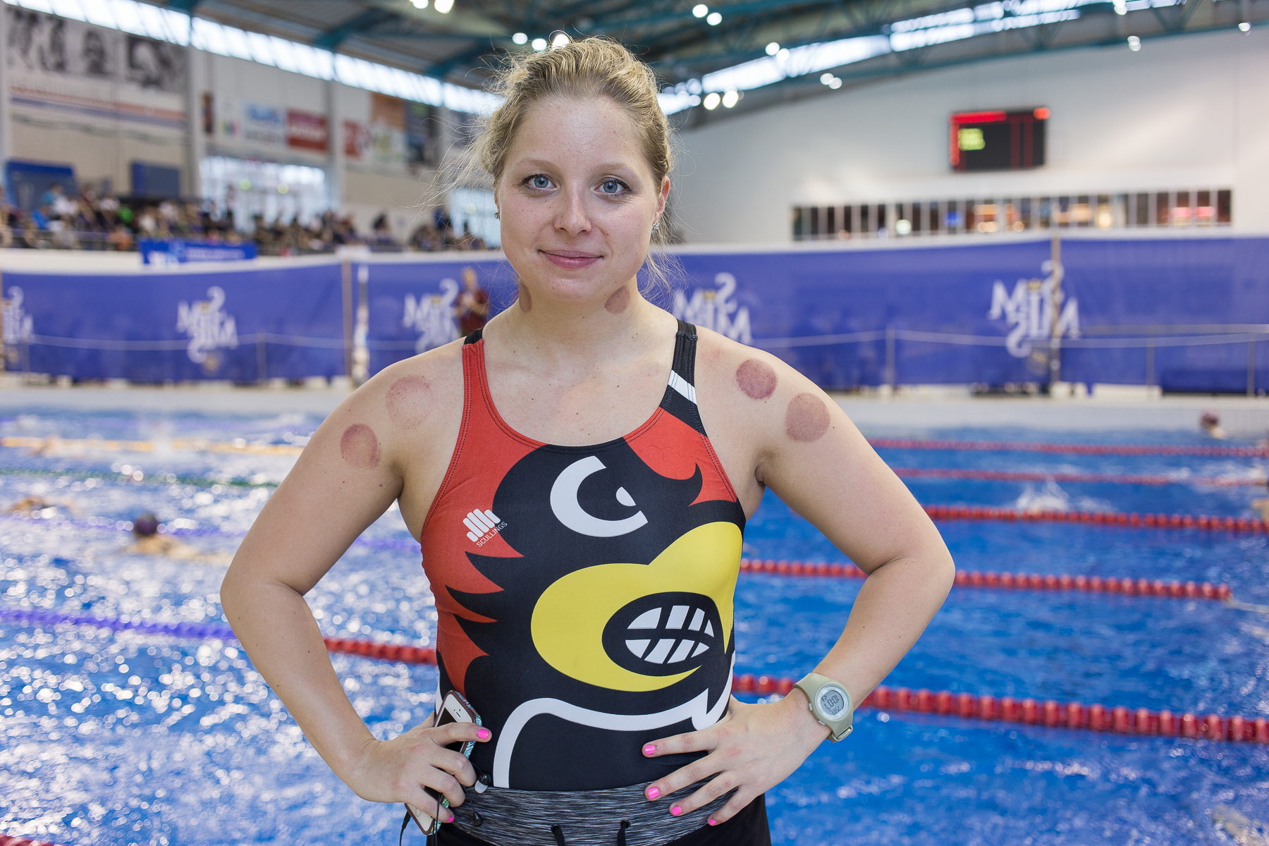 Mika Ruusunen - Uinnin SM kisat 2016 - Mäkelänrinteen Uimahalli, Helsinki 25.3.2016